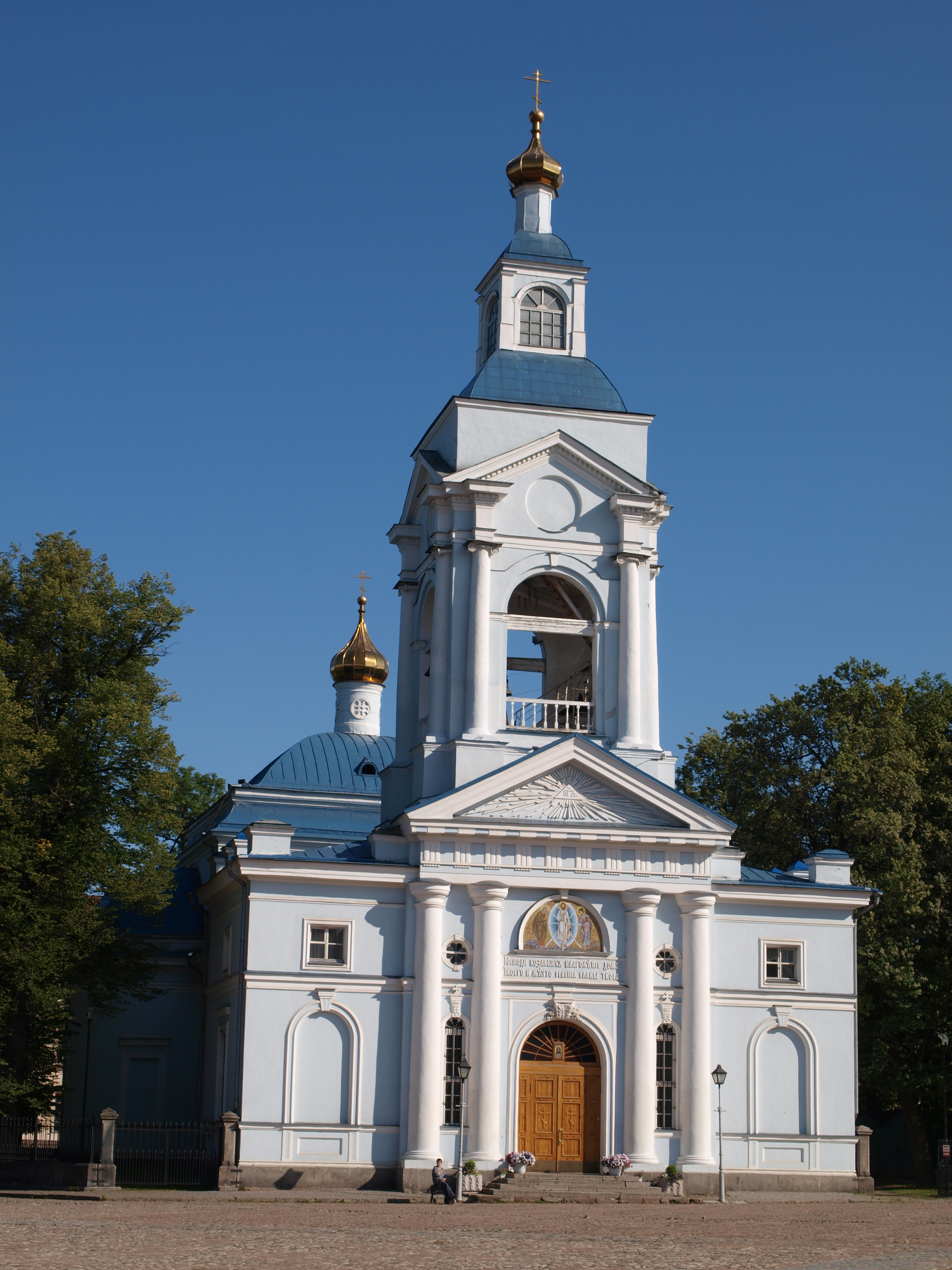 Спасо-Преображенский собор: площадь Театральная, 2, Выборг, Выборгский район, Ленинградская область